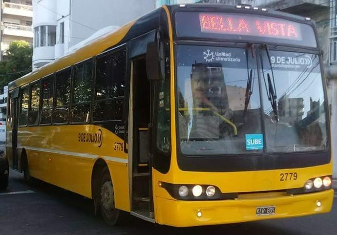 Mercedes-Benz O-500 de la línea 104. Bella Vista es uno de los destinos de la línea, que a su vez posee variantes.